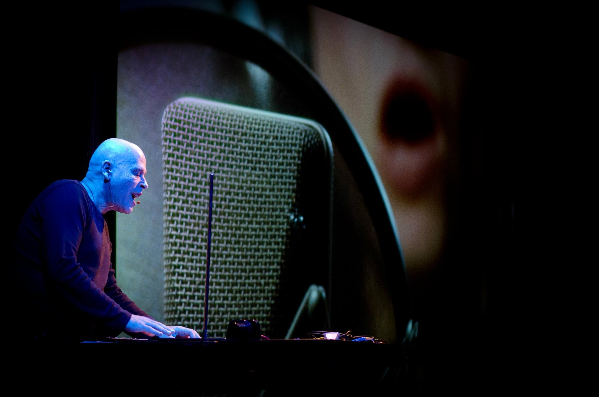 אבי בנימין במופע "פסקול חי לסרט שאינו קיים"